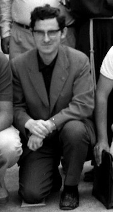 Joseba Intxausti erdian . Lizundia eta Kintanaren artean. Euskaltzaindia Arantzazu 1972-7-29